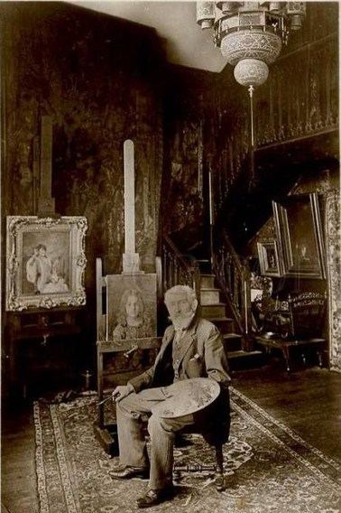 Художник Алексей Алексеевич Харламов в мастерской (1890)